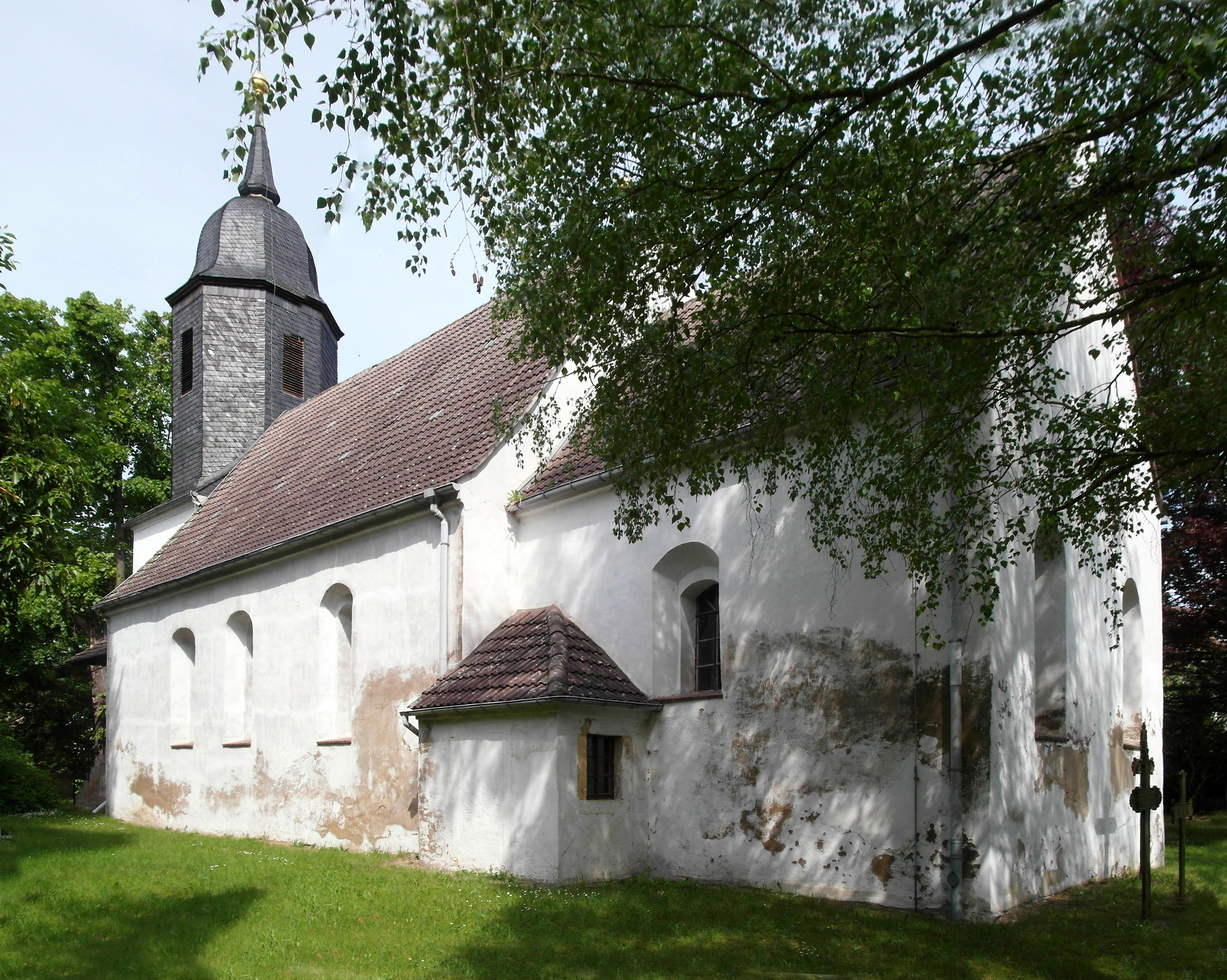 19.05.2016 01609 Streumen (Wülknitz): Dorfstraße 28 (GMP: 51.356288,13.406117): Dorfkirche, Sicht von Südosten. Als Jahr der Erbauung wird 1401 angegeben. Dicke Feldsteinmauern und die Form der Fenster erinnern an die spätromanische Bauweise. 1594 bekam die Kirche einen Dachreiter, der 1748 durch einen Turm ersetzt wurde. 1841 wurden die Spitzbogenfenster erweitert und der Chor um einen Meter erhöht. [SMA6108-6109.JPG]20160519600MDR.JPG(c)Blobelt